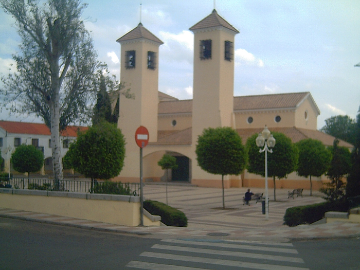 Iglesia de San José de Puertollano, Spain.